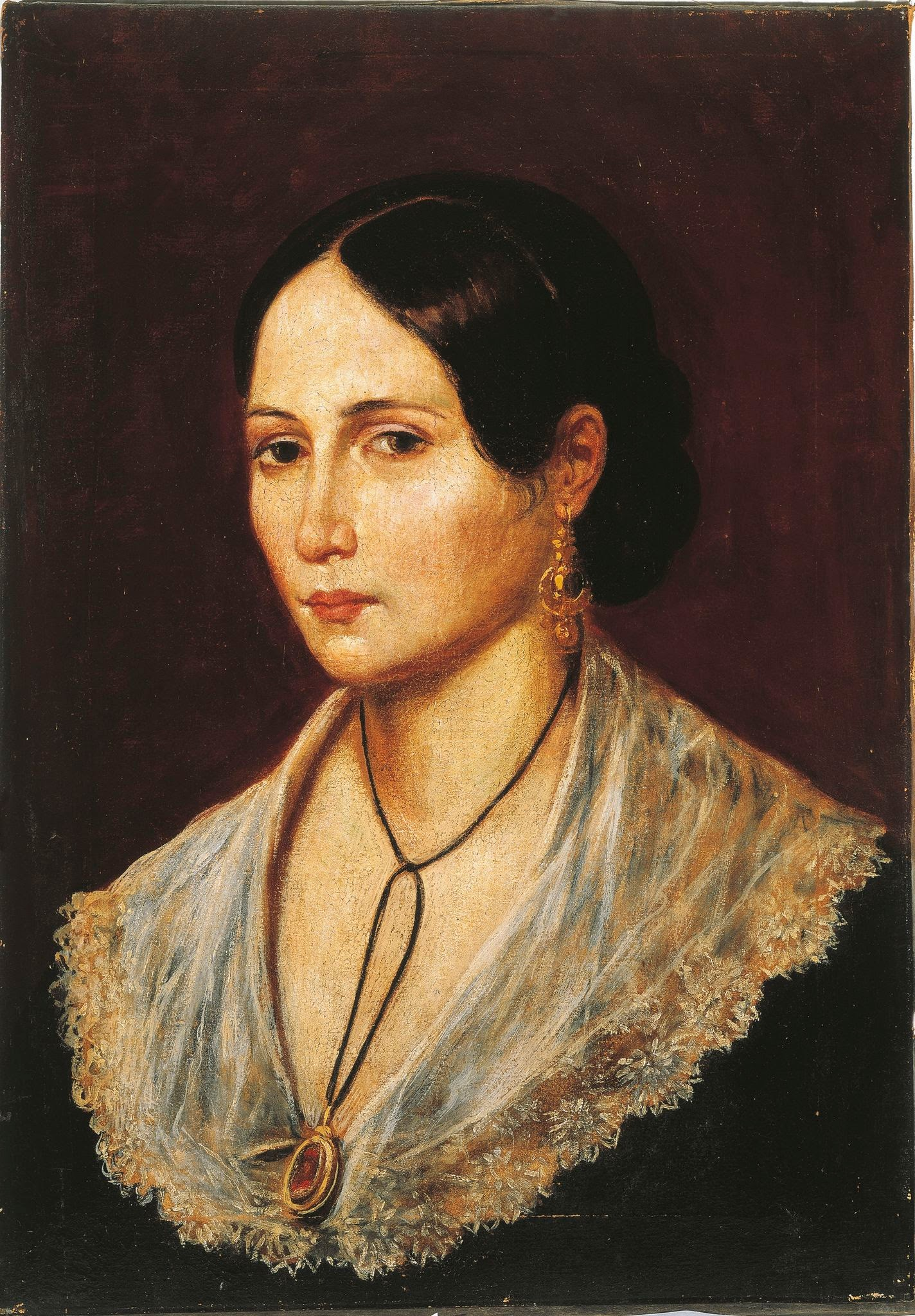 Anita Garibaldi raffigurata dal pittore genovese Gaetano Gallino, nel 1845, a Montevideo. È l'unico ritratto esistente, preso dal vero, di Anita.